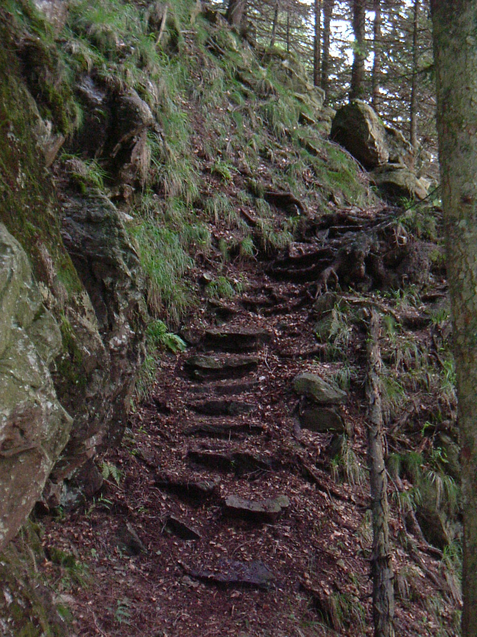 Stufen am Alpinen Pfad